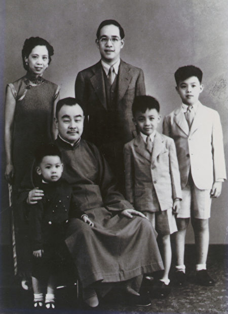 錢思亮、張婉度夫婦（後排）一家五口和其父親錢鴻業（前左二）攝於1937年上海。前排錢思亮夫婦三子從左至右依次為錢復（三子），錢煦（次子）和錢純（長子）。